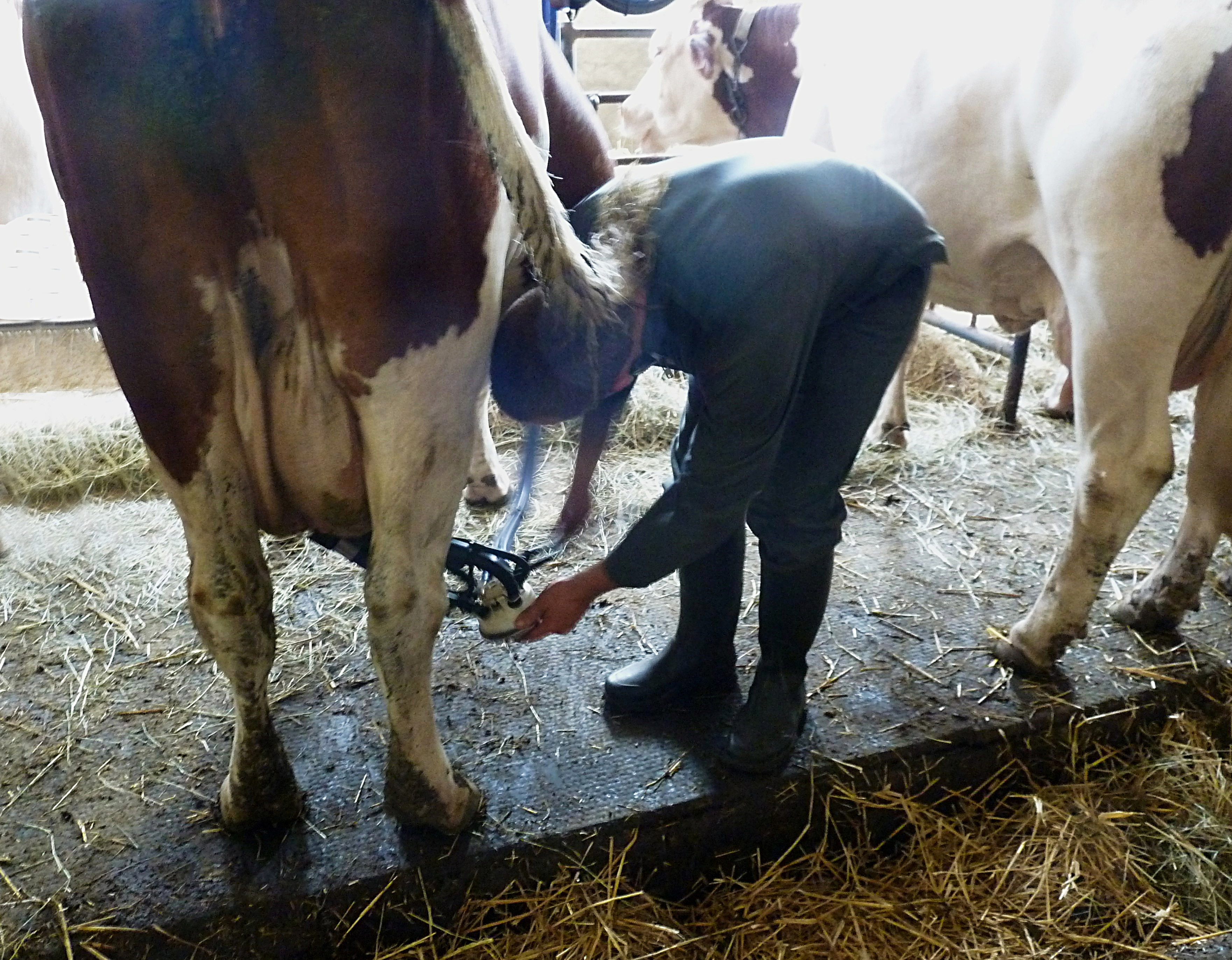 La traite des vaches dans une ferme de Saint-Nectaire pour la fabrication du Fromage .- Monts Dore Puy-de-Dôme.- France